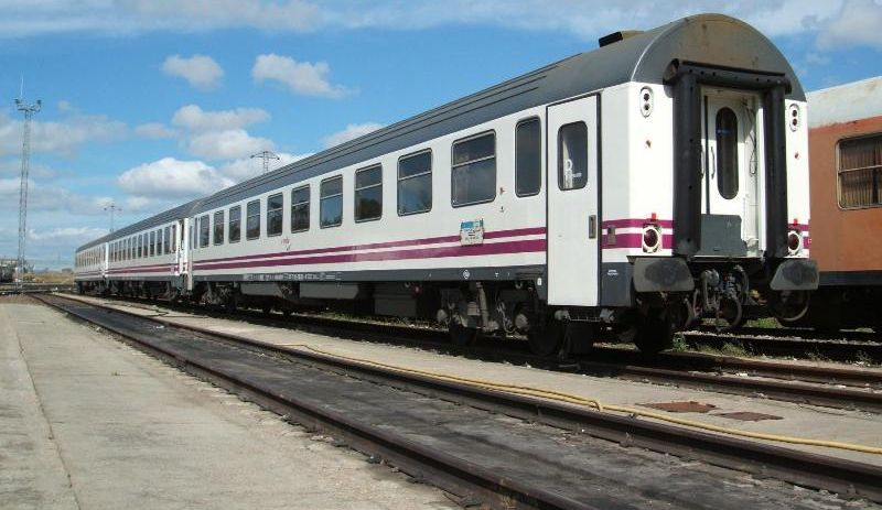 Coche de primera clase A10x 10000 formando parte de la rama del Estrella Pío Baroja con destino a Barcelona. Lugar: Depósito de Salamanca.